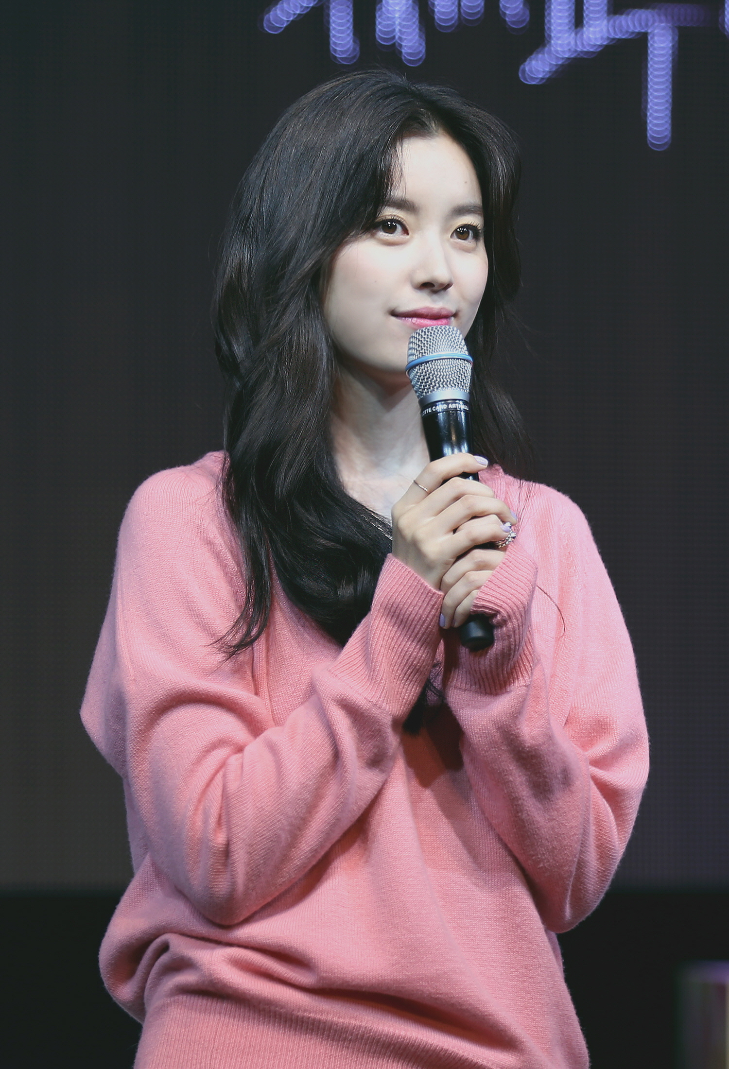 170617 한효주 팬미팅